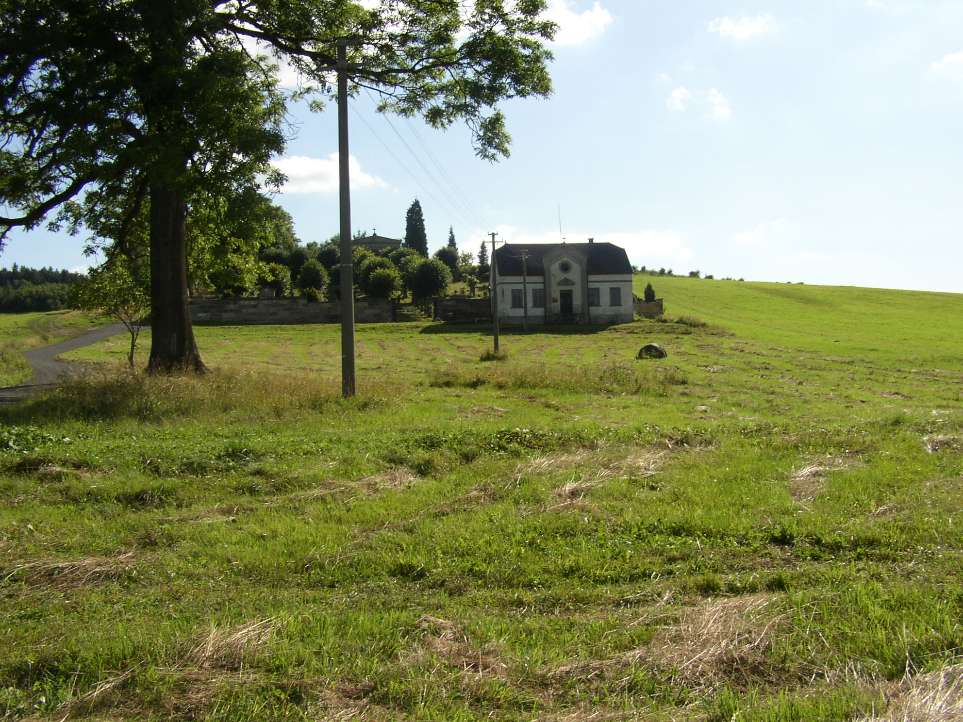 Hřbitov v Horním Podluží